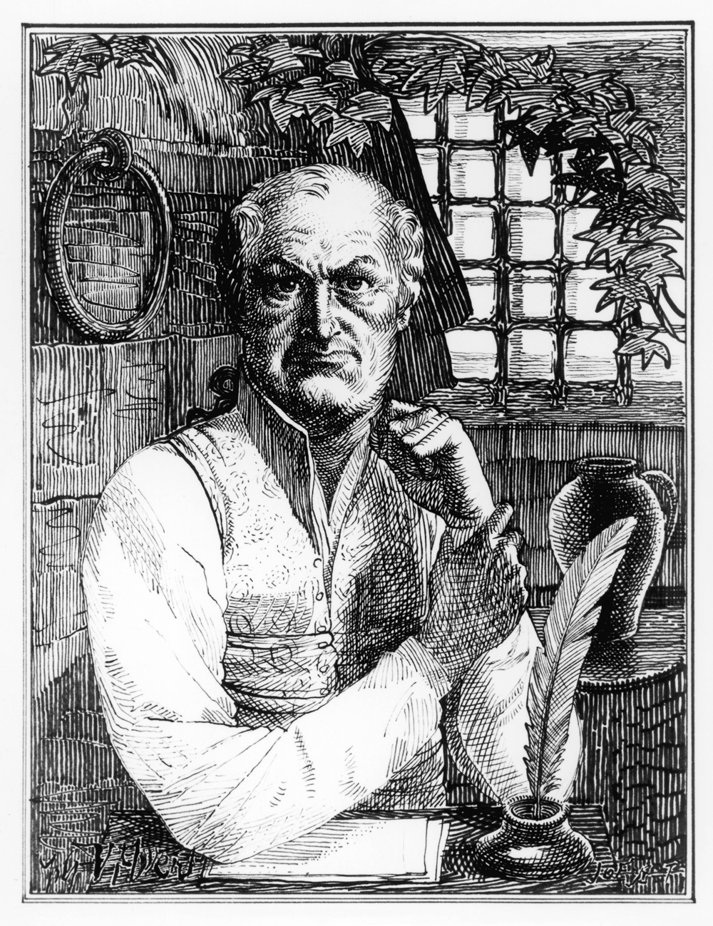 Portrait_de_Sade